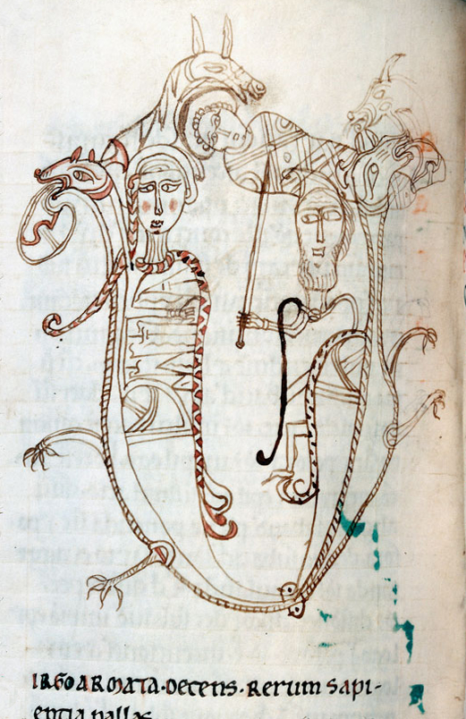 Nuptiis Philologiae et Mercurii (De) / Martianus Capella Alençon - BM - ms. 0635 - f. 103v